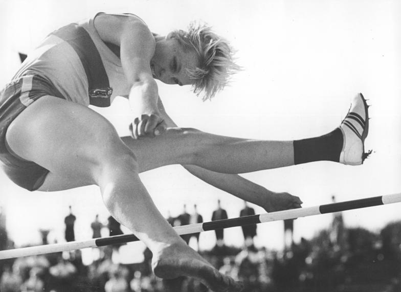 Rita Gildemeister Zentralbild Gahlbeck 26.7.1965 Karl-Marx-Stadt: XVI. Deutsche Meisterschaften der Leichathleten am 25.7.1965 im Ernst-Thälmann-Stadion. UBz: Rita Gildemeister (SC Leipzig) konnte sich im Hochsprung mit 1,71 m den Meistertitel erkämpfen.